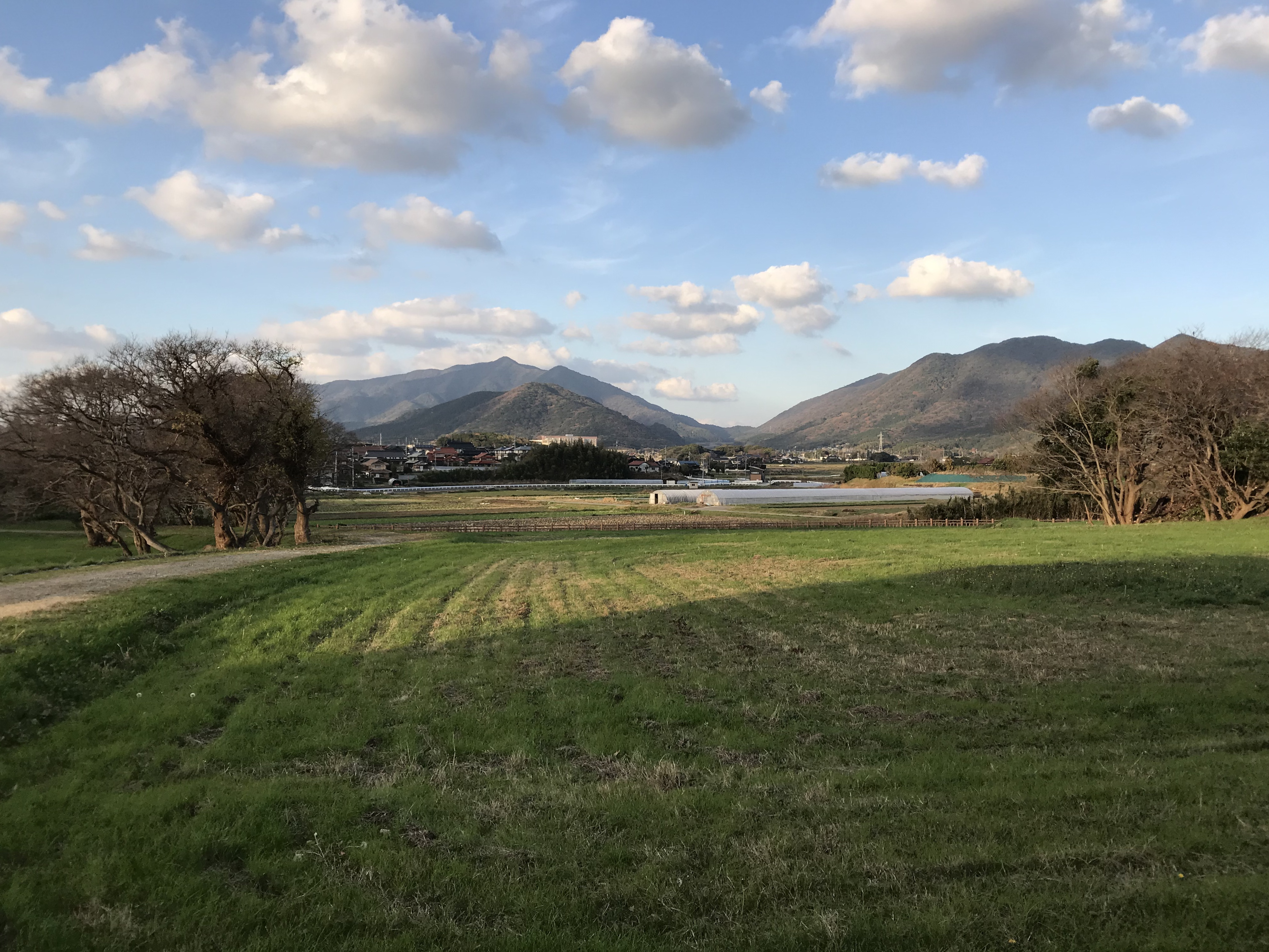 下関市立考古博物館北側より望む竜王山